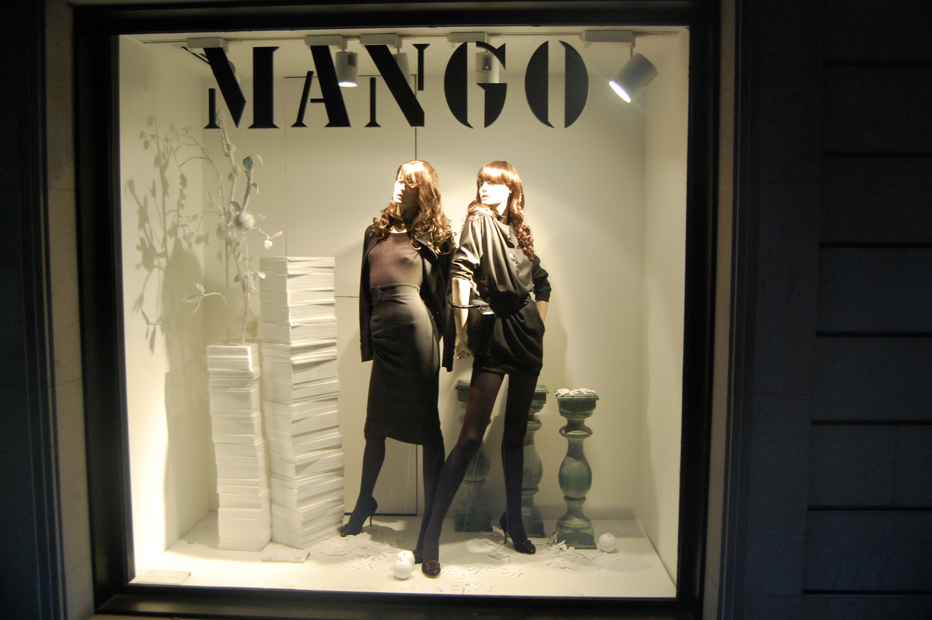 Mango Chutney